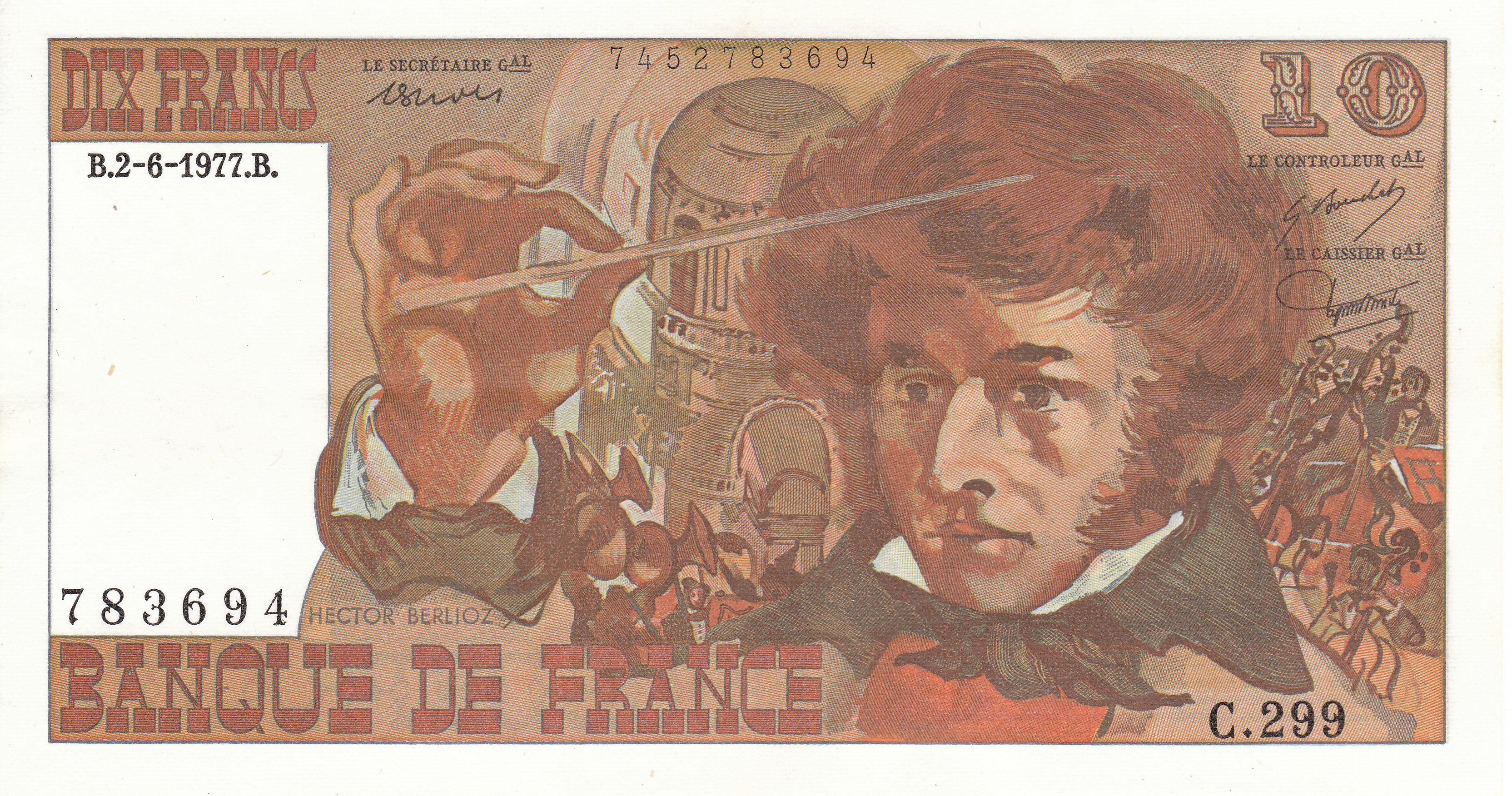 10 francs Berlioz (1977)